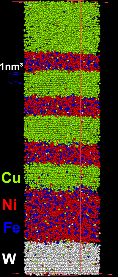 Visualisierung von Atomsondendaten eines Cu/Ni-Fe Multilayersystems auf einem Wolframsubstrat ohne Wärmebehandhlung